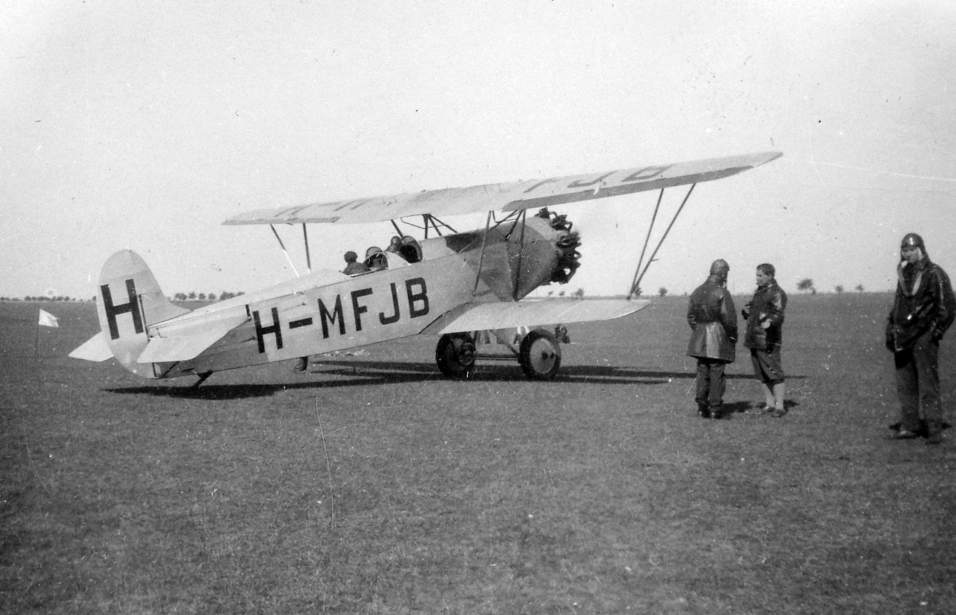 Weiss Manfréd-Fokker C.V.D. típusú repülőgép. Tags: airplane, airport, pilot, transport, Royal Hungarian Air Force, Weiss Manfréd-brand, license, Hungarian brand, biplane Title: Weiss Manfréd-Fokker C.V.D. típusú repülőgép.